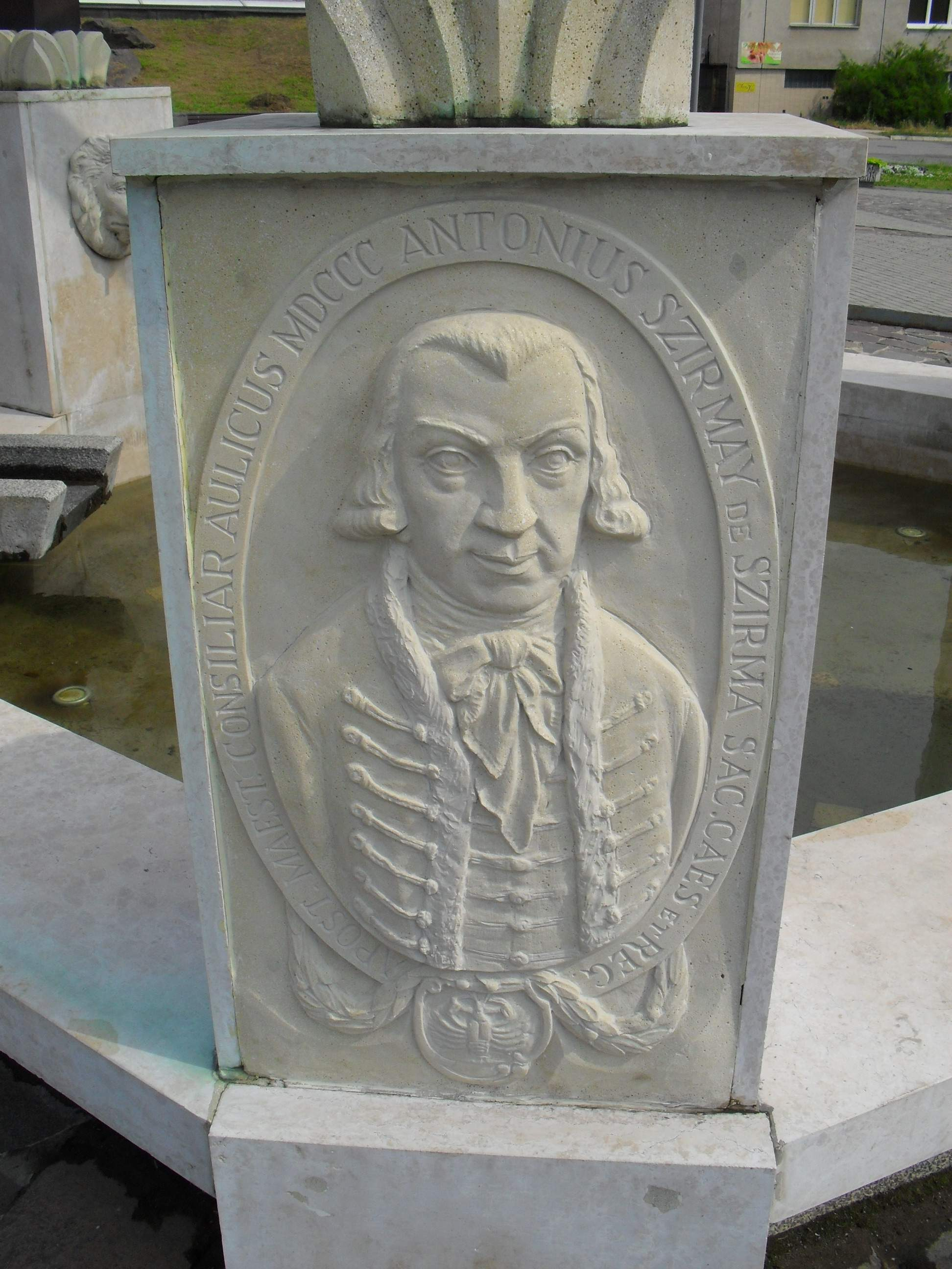 Királyhelmec - szökőkút - Szirmay Antal domborműve